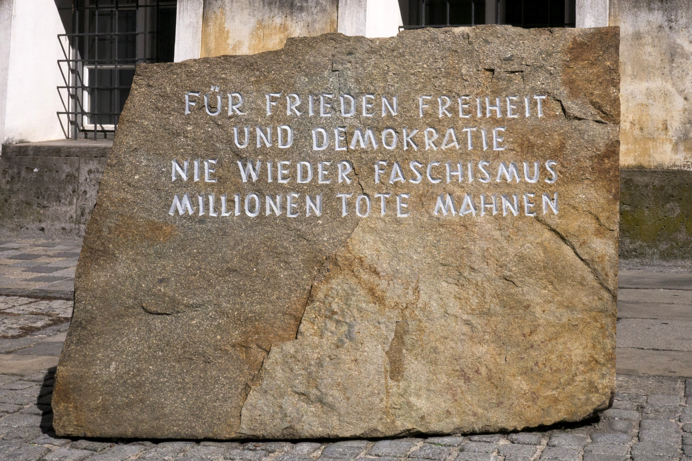 Bürgerhaus